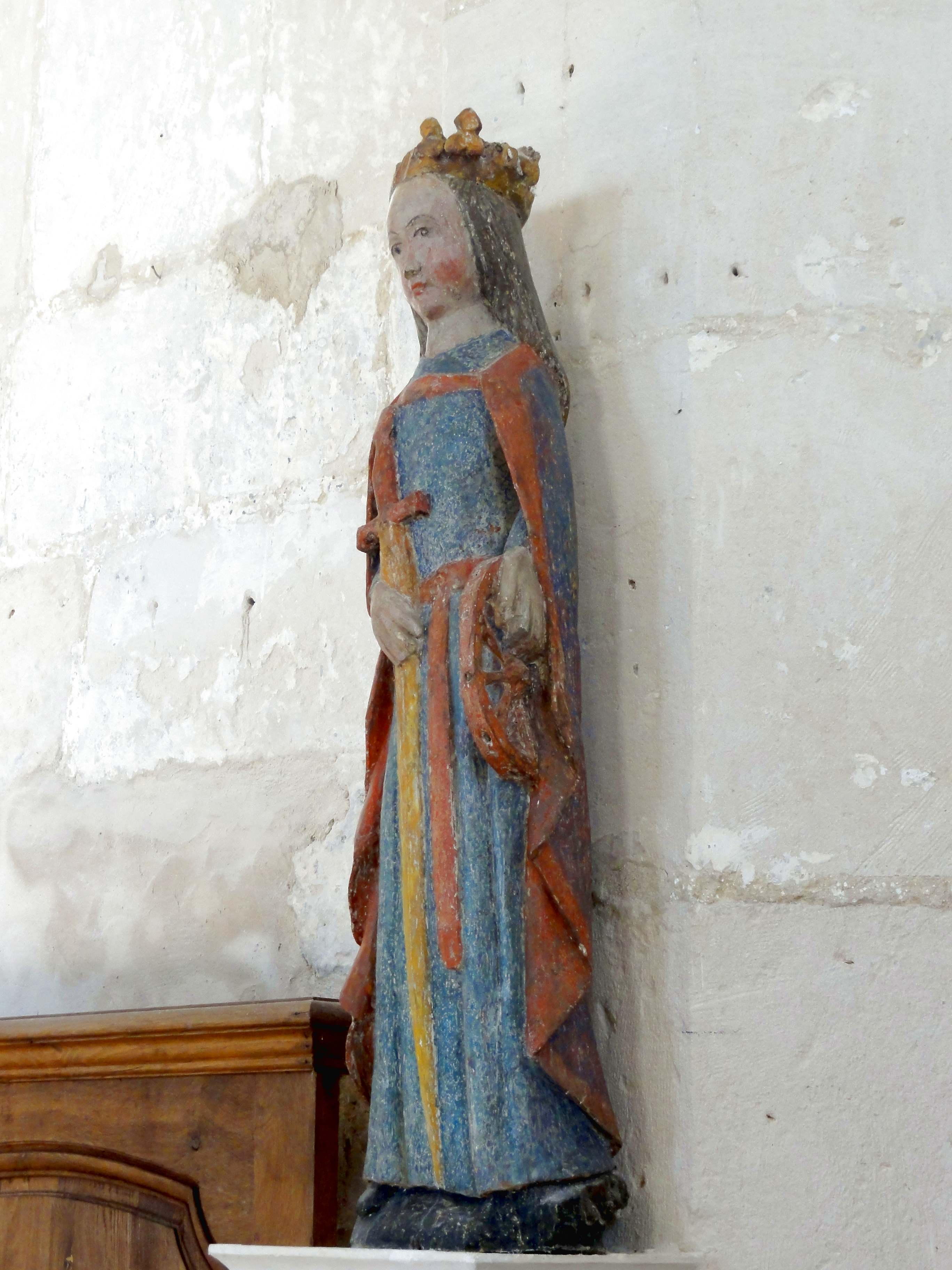 Mobilier de l'église (voir titre).